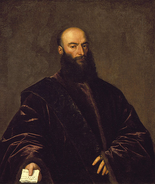 Tiziano, ritratto di jacopo dolfin